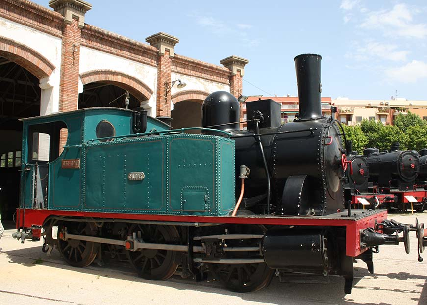 Locomotora de vapor any 1887